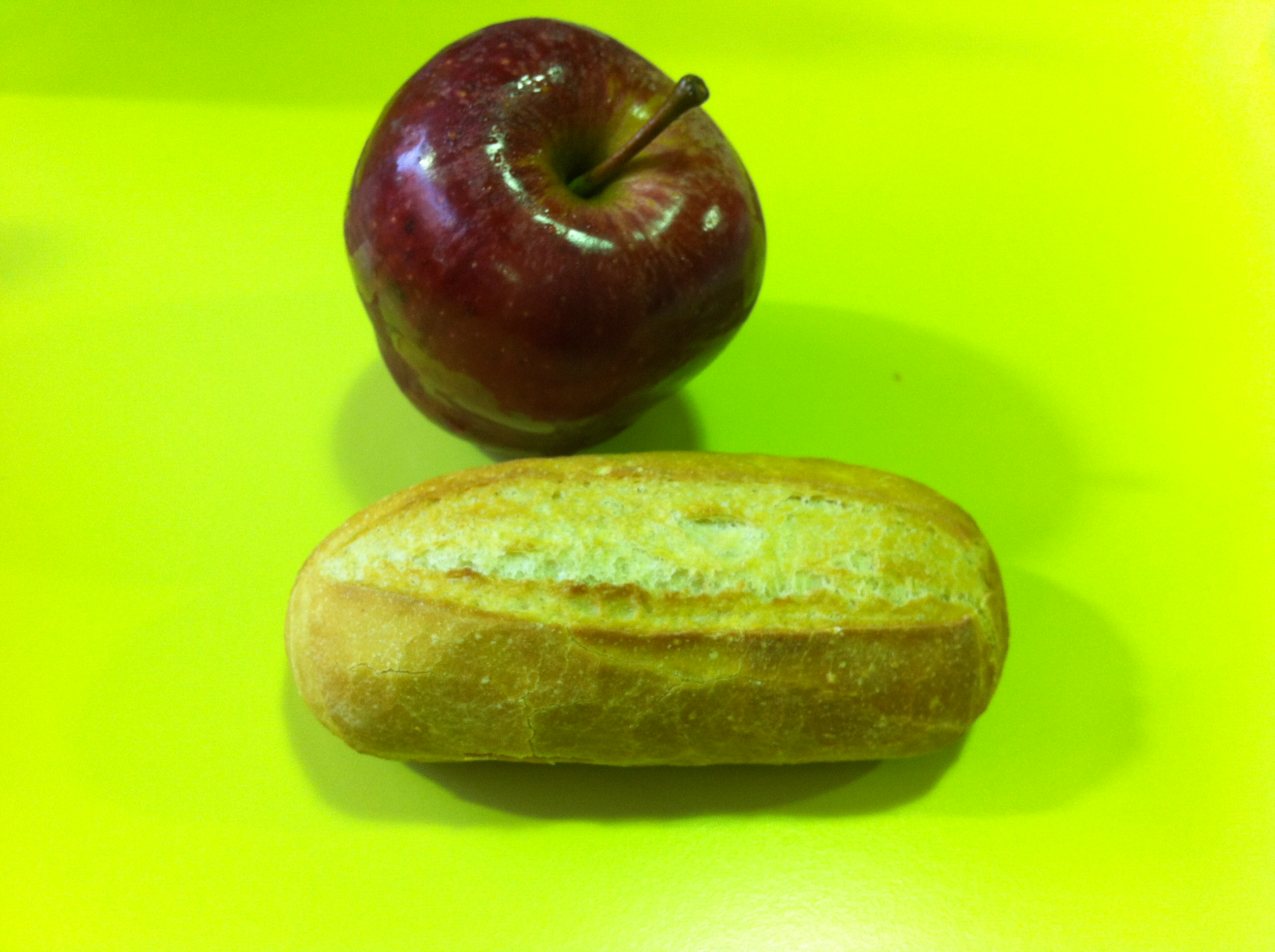 Les fruites i el pa són dos tipus de aliments que aporten una gran quantitat de carbohidrats, els quals, més tard són aprofitats pel cos humà per obtindre energia de forma ràpida.